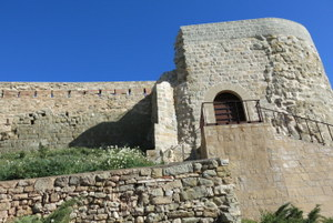 castell de Calaf a la comarca de l'Anoia - Catalunya